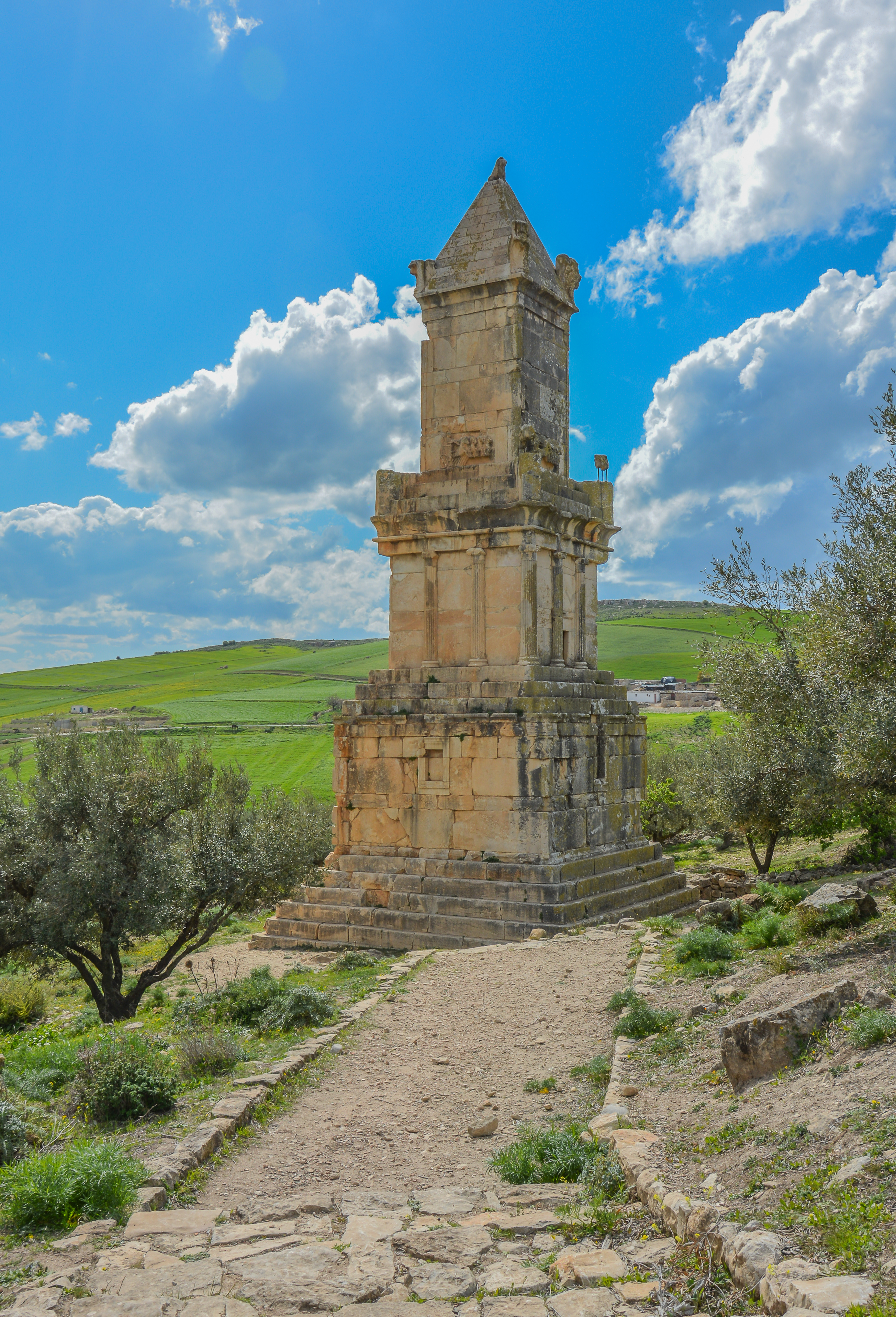 Grand mausolée